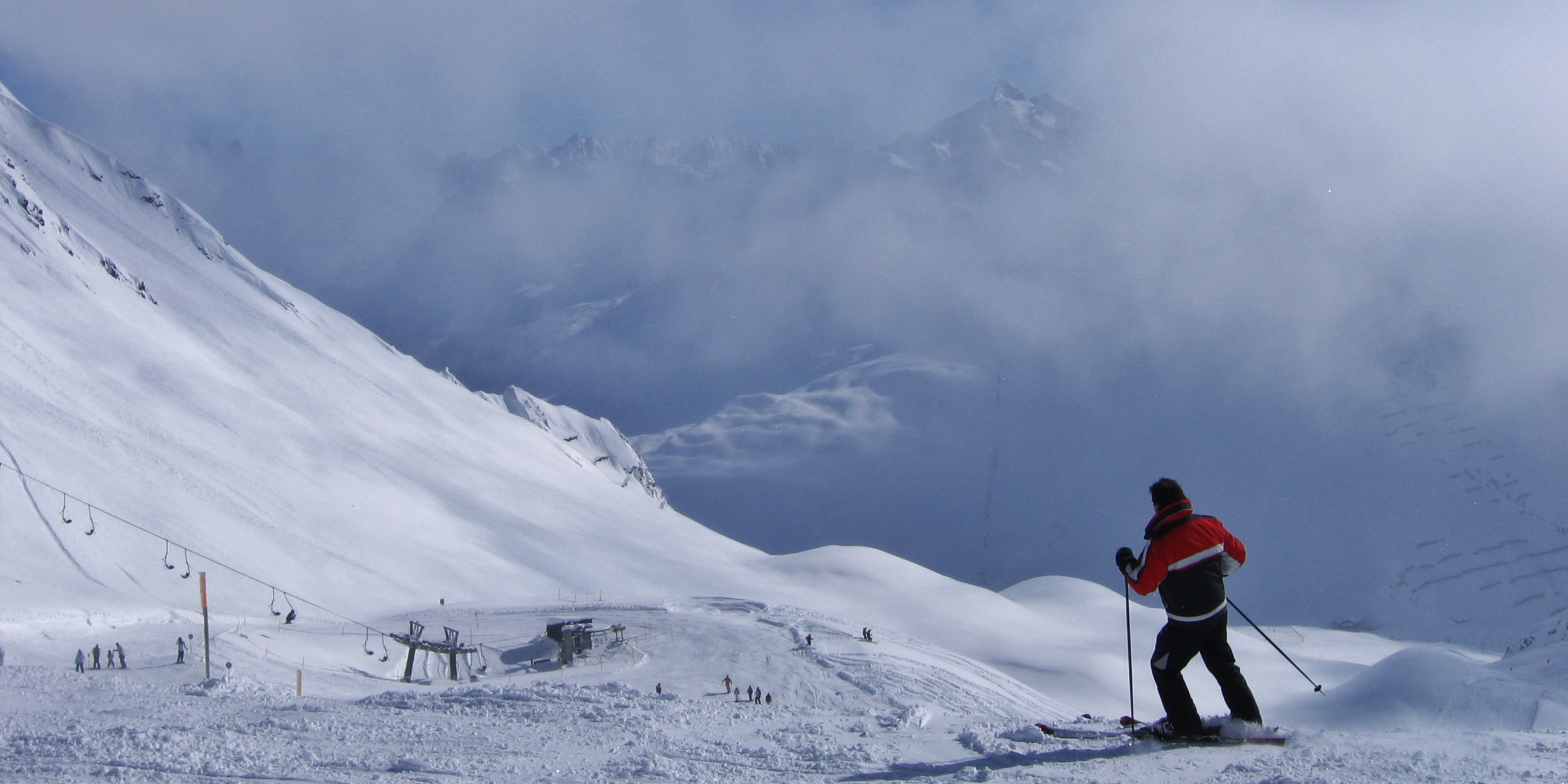 Skigebiet Silvretta Montafon